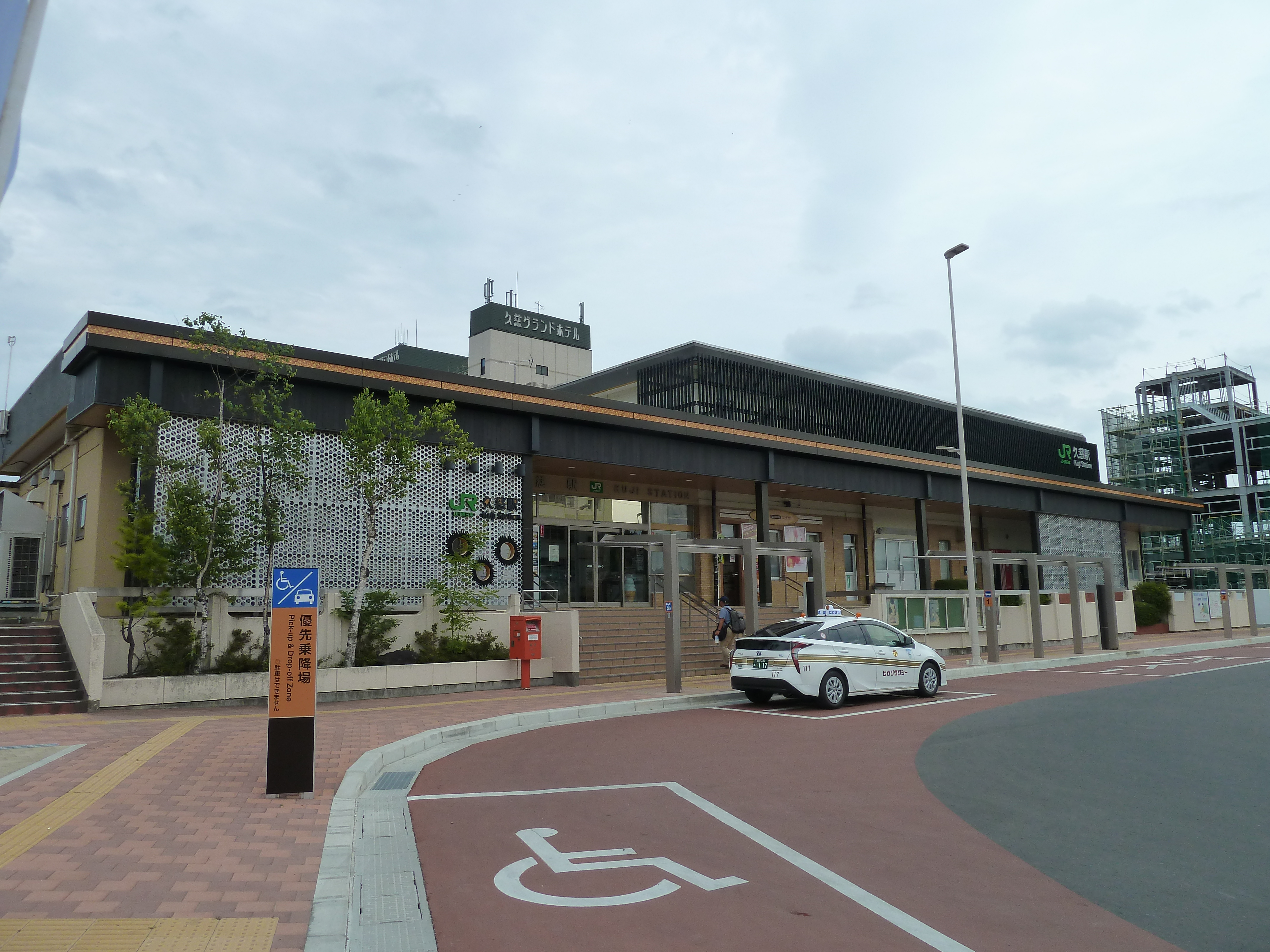 リニューアル後の久慈駅